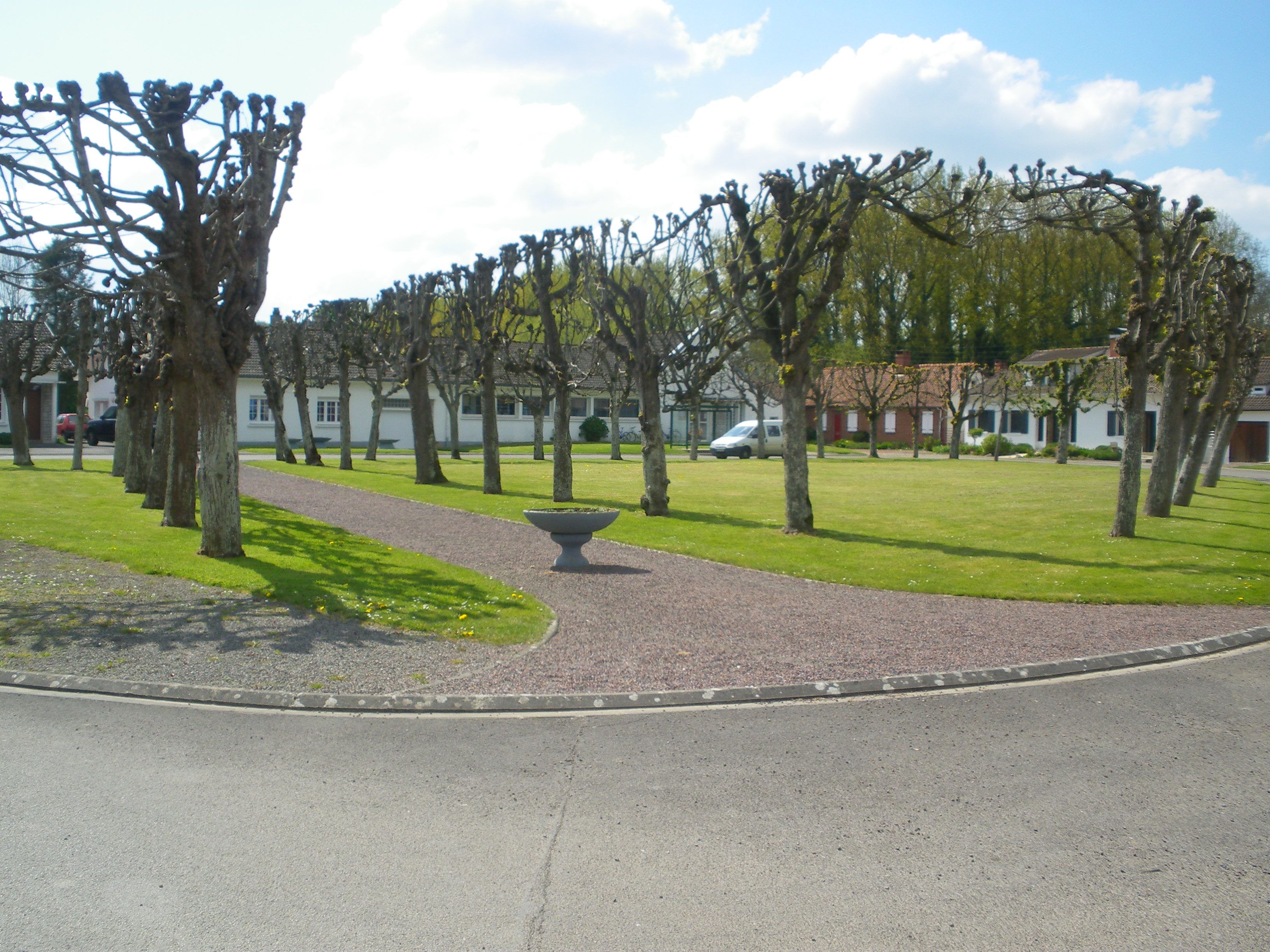 Vue de la place de Raye-sur-Authie.